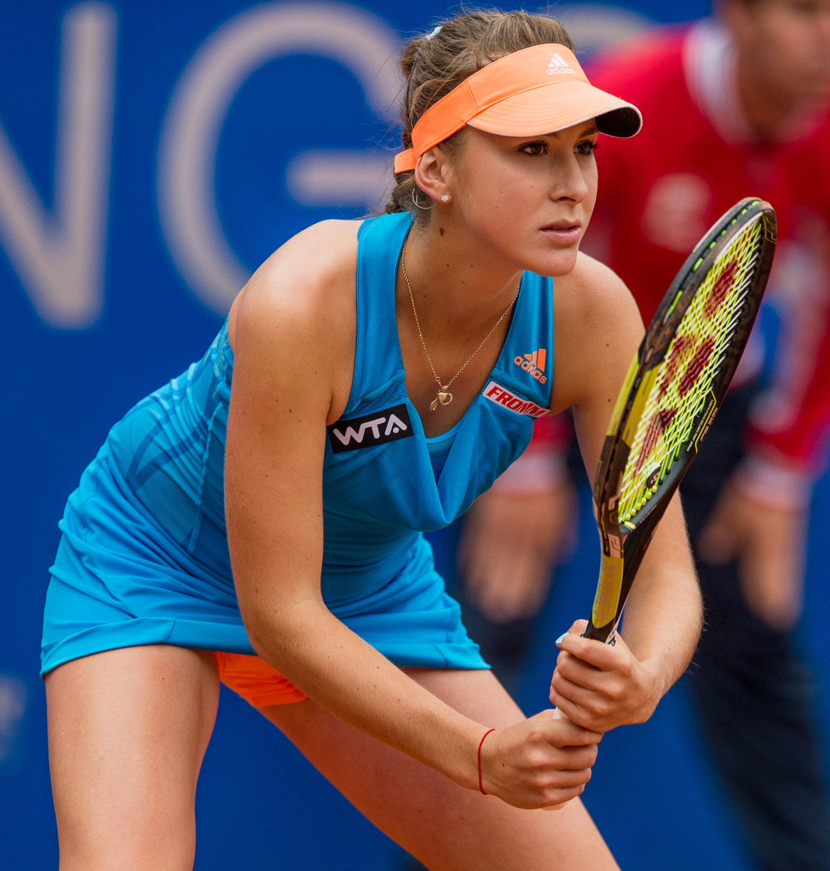 Belinda Bencic,Belinda Bencicová,Damentennis,Nürnberger Versicherungscup 2014,Tennis,WTA